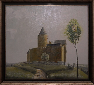 Hrad Valdek, olej na plátně 71x79 cm